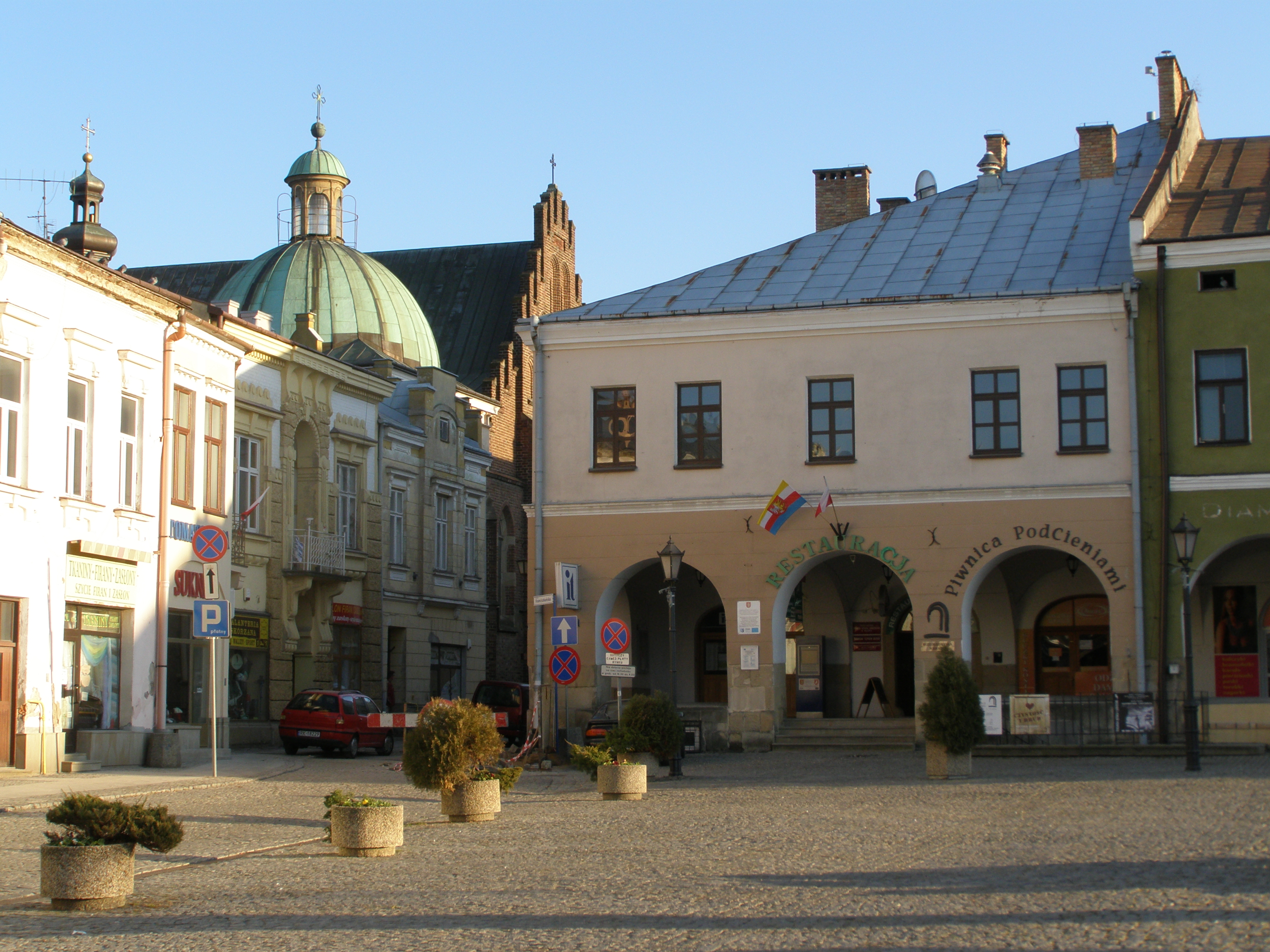 Krosno. Dom Curia Praetoriana - Rynek 5